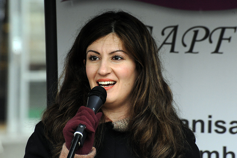 Nisti Stêrk